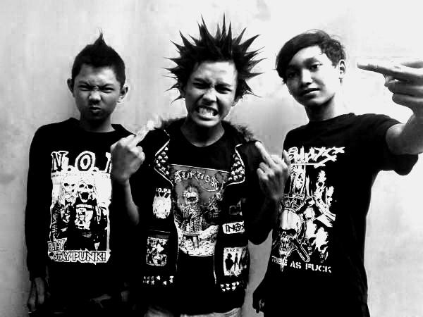 Dewa, Alex dan Budi